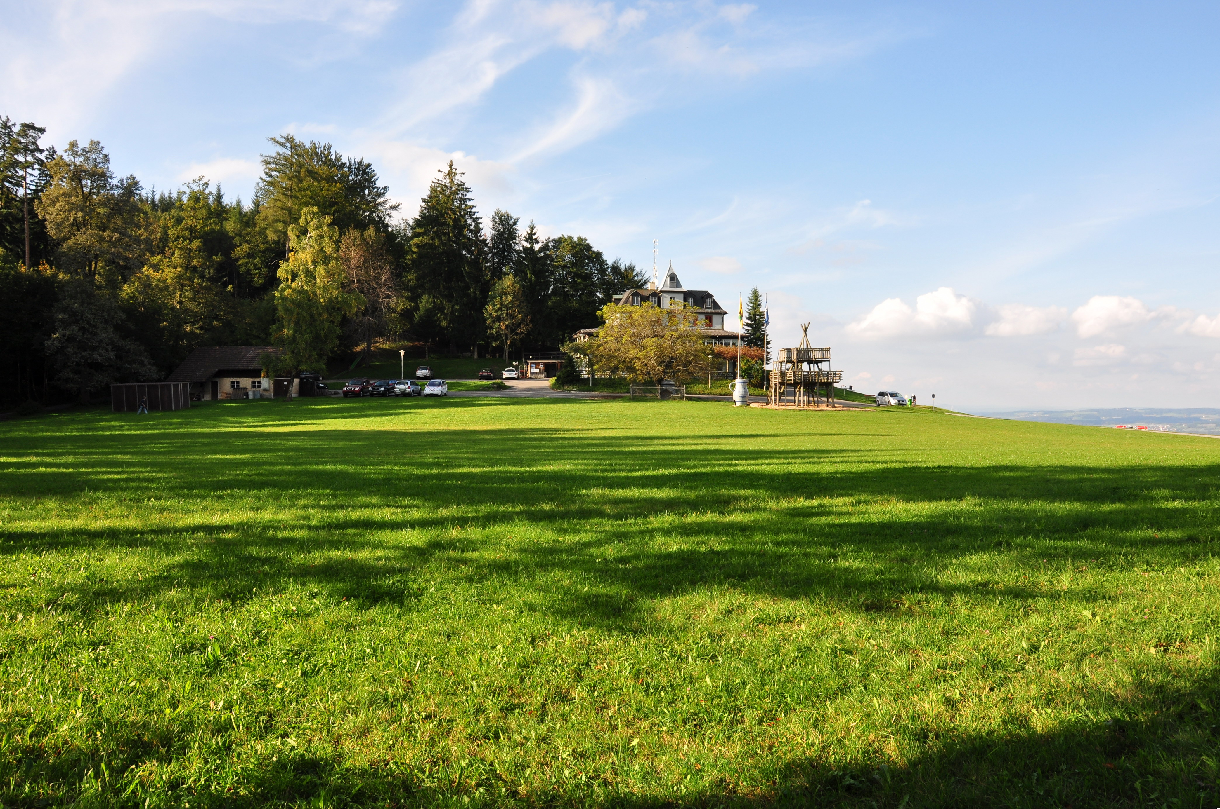 Pfannenstiel Hochwacht (Switzerland)